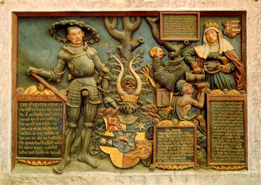 Landgraf Philipp der Gromütige auf einem Steinrelief in der Klosterkirche Haina